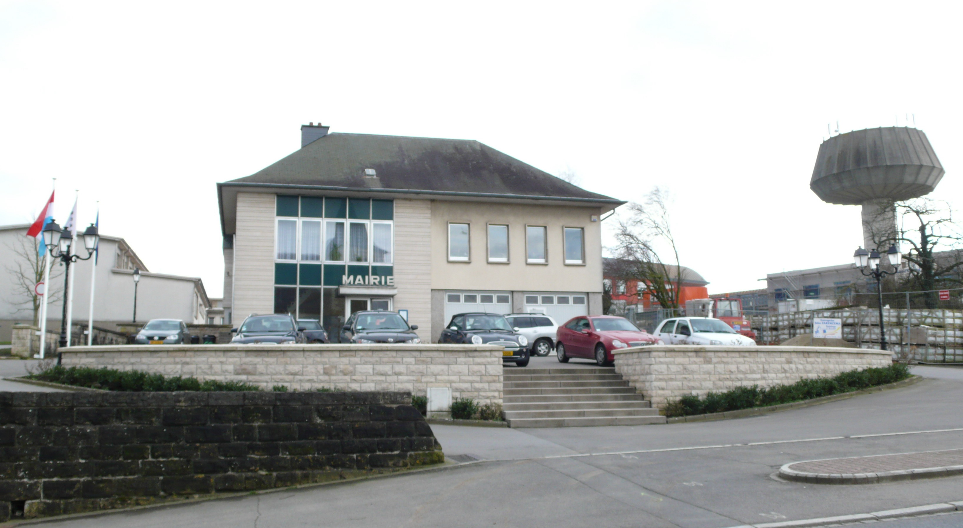 Gemeng Fréiseng .